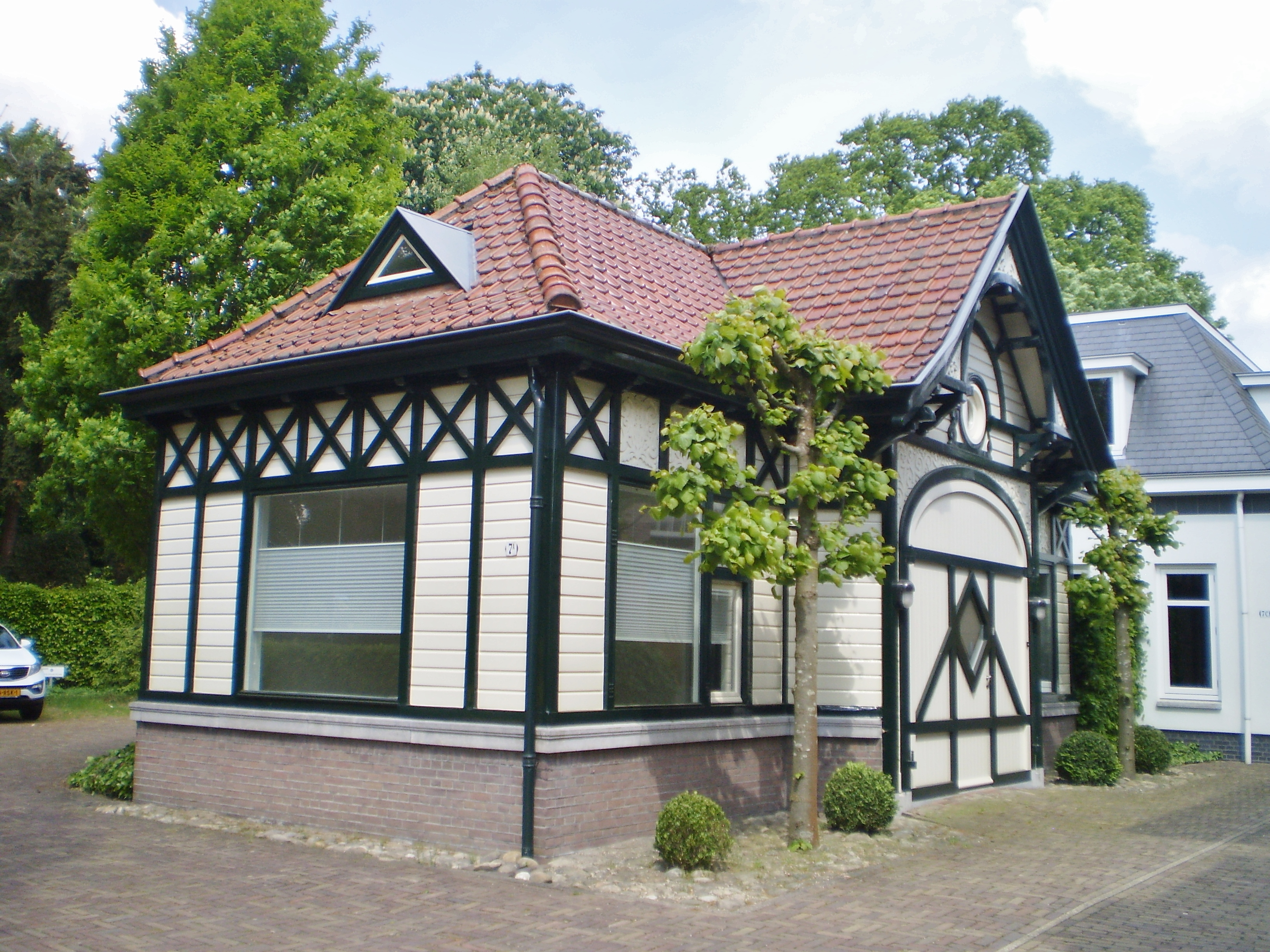 Koetshuis vanaf de Javalaan